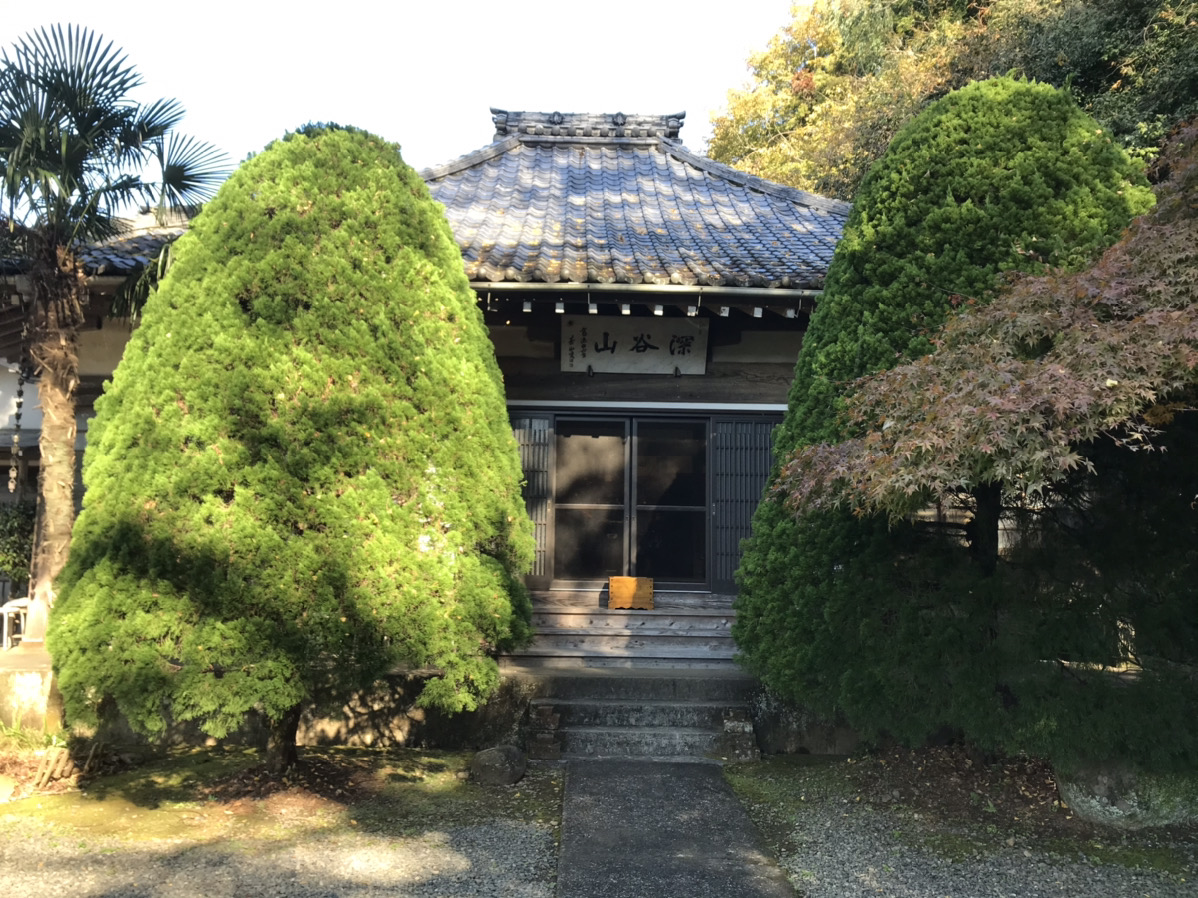 長源寺を正面から撮影